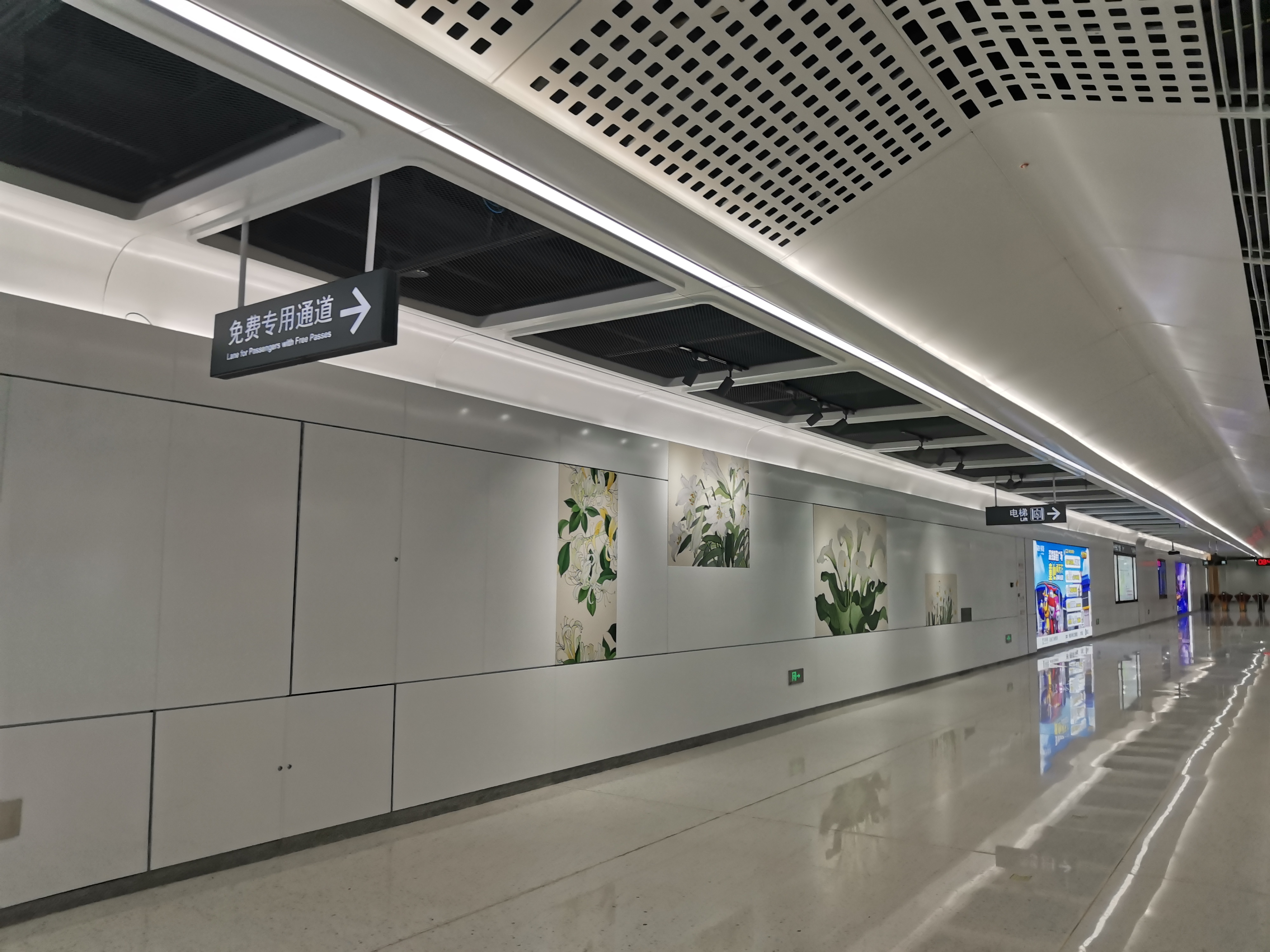 深圳地铁10号线孖岭站大堂